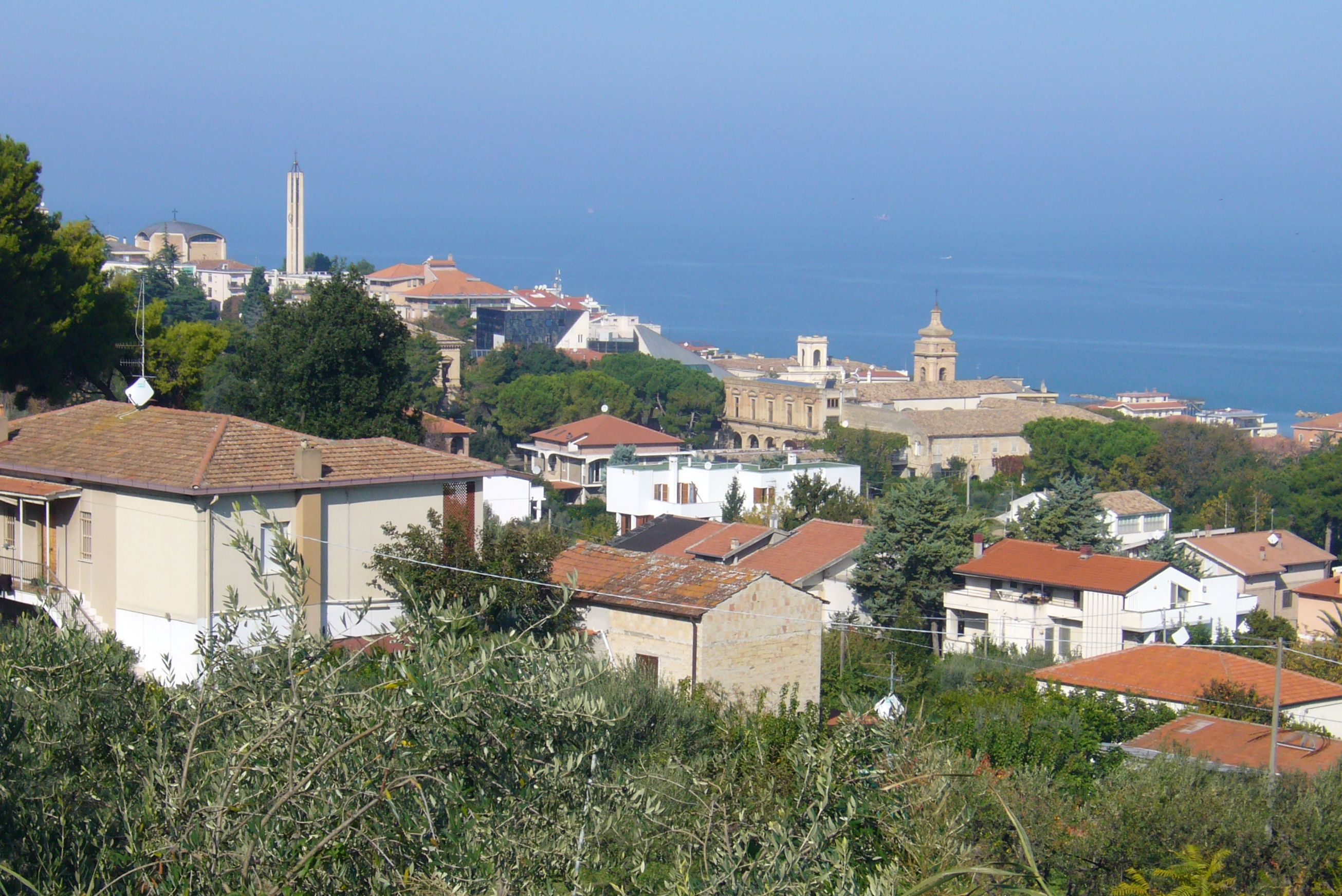 Vista dai colli